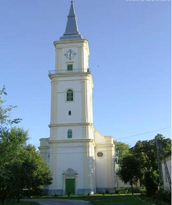 Püspökladányi református templom késő barokk, 1792. Megújítva 1859-ben és 1935-ben. Műemléki védelem. Azonosító: 5383, törzsszám: 1912 - Hajdú-Bihar m., Püspökladány, Kálvin tér 1. This is a photo of a monument in Hungary. Identifier: 5383